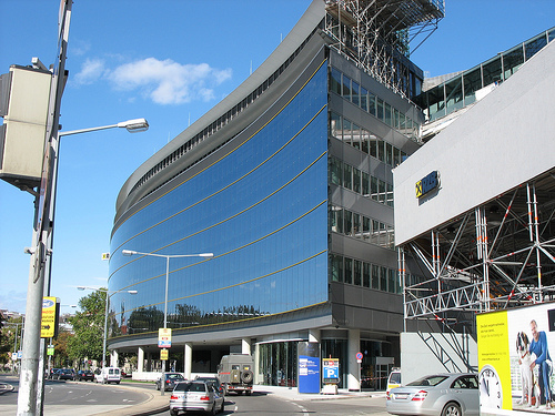 Raiffeisen International Bank-Holding AG, Am Stadtpark 3, A-1030 Wien